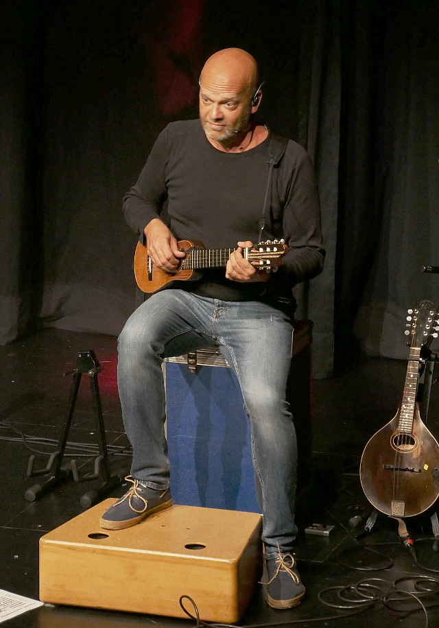 Rainer Schacht am 02.08.2017 in Herborn